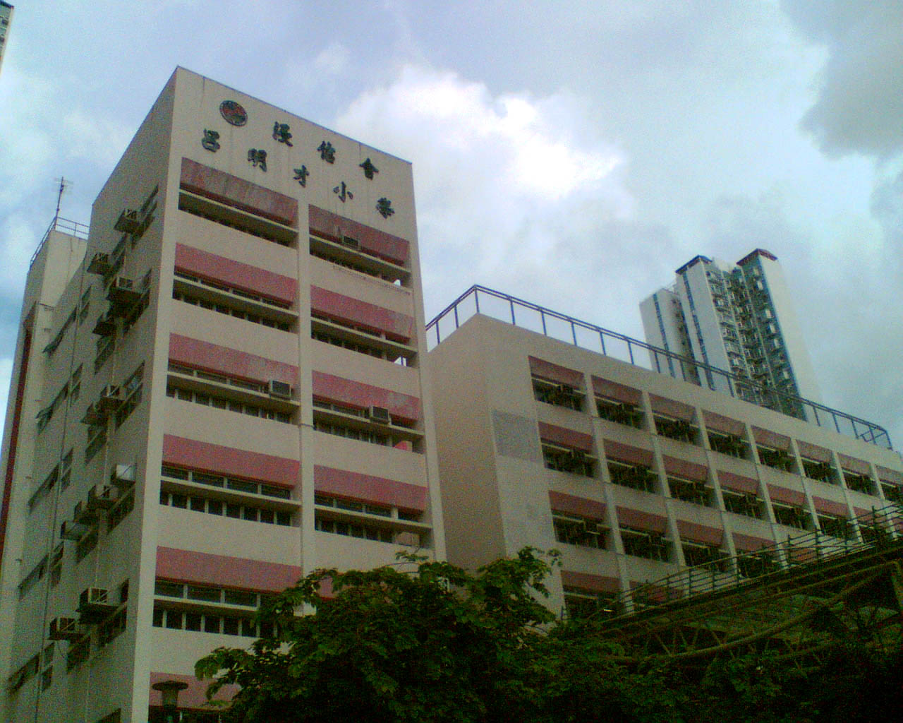 中文（香港）: 浸信會呂明才小學。